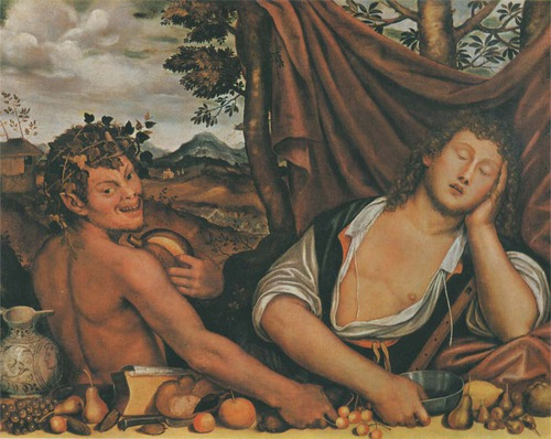 Niccolo Frangipane, Allegoria dell'autunno Musei Civici Udine